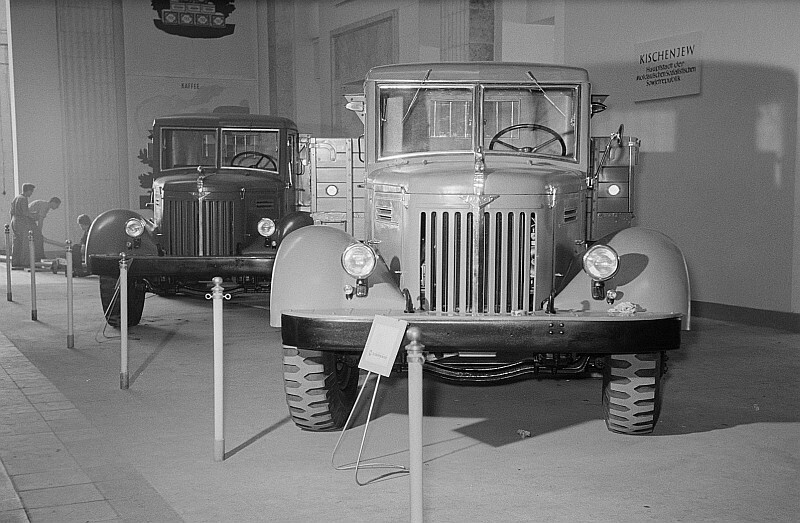 Original image description from the Deutsche Fotothek Sowjetische LKW auf der Leipziger Herbstmesse 1954